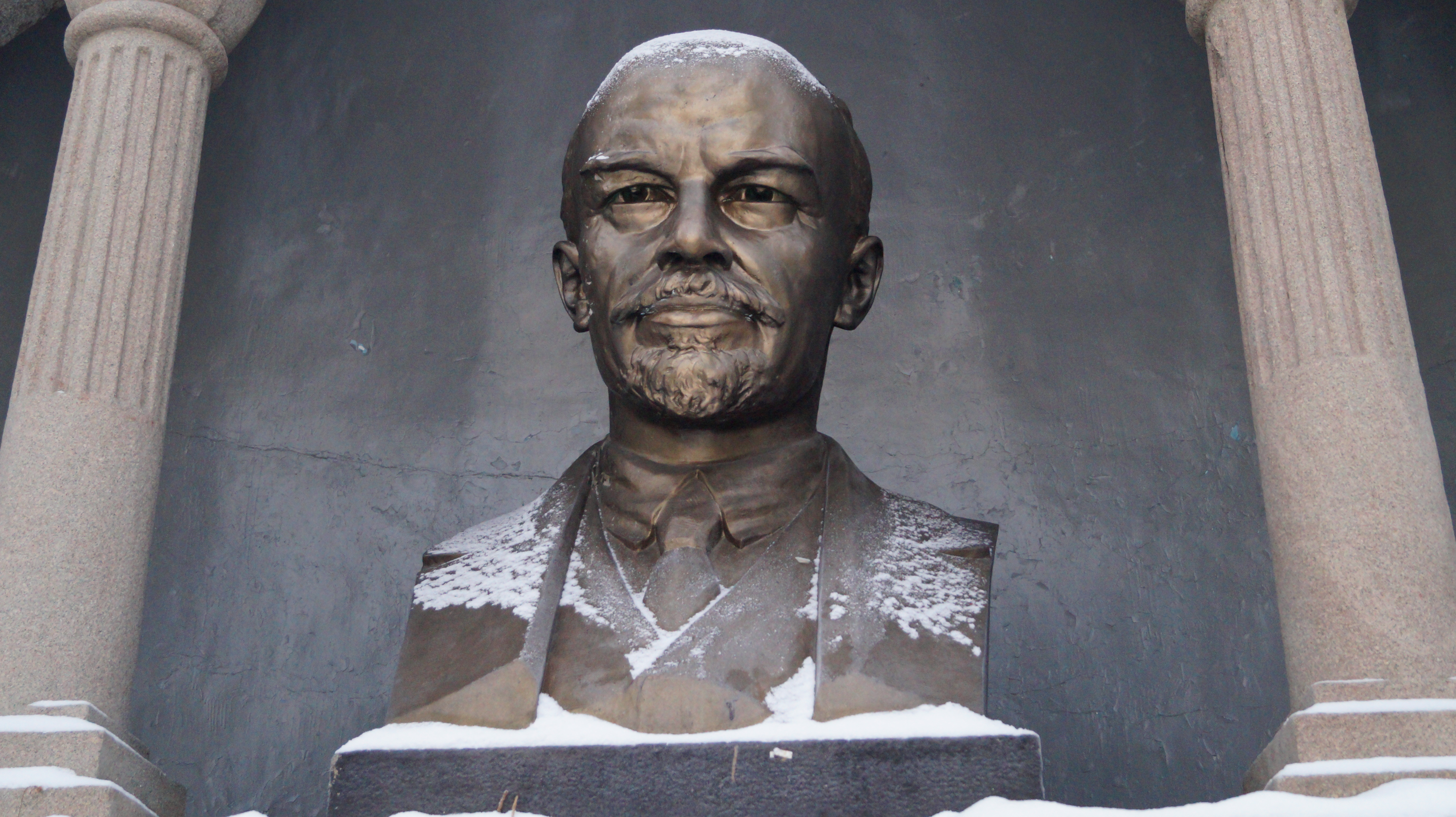 Памятник-мавзолей В. И. Ленину в Челябинске. Бюст. 1925 год. Автор: В. В. Козлов.